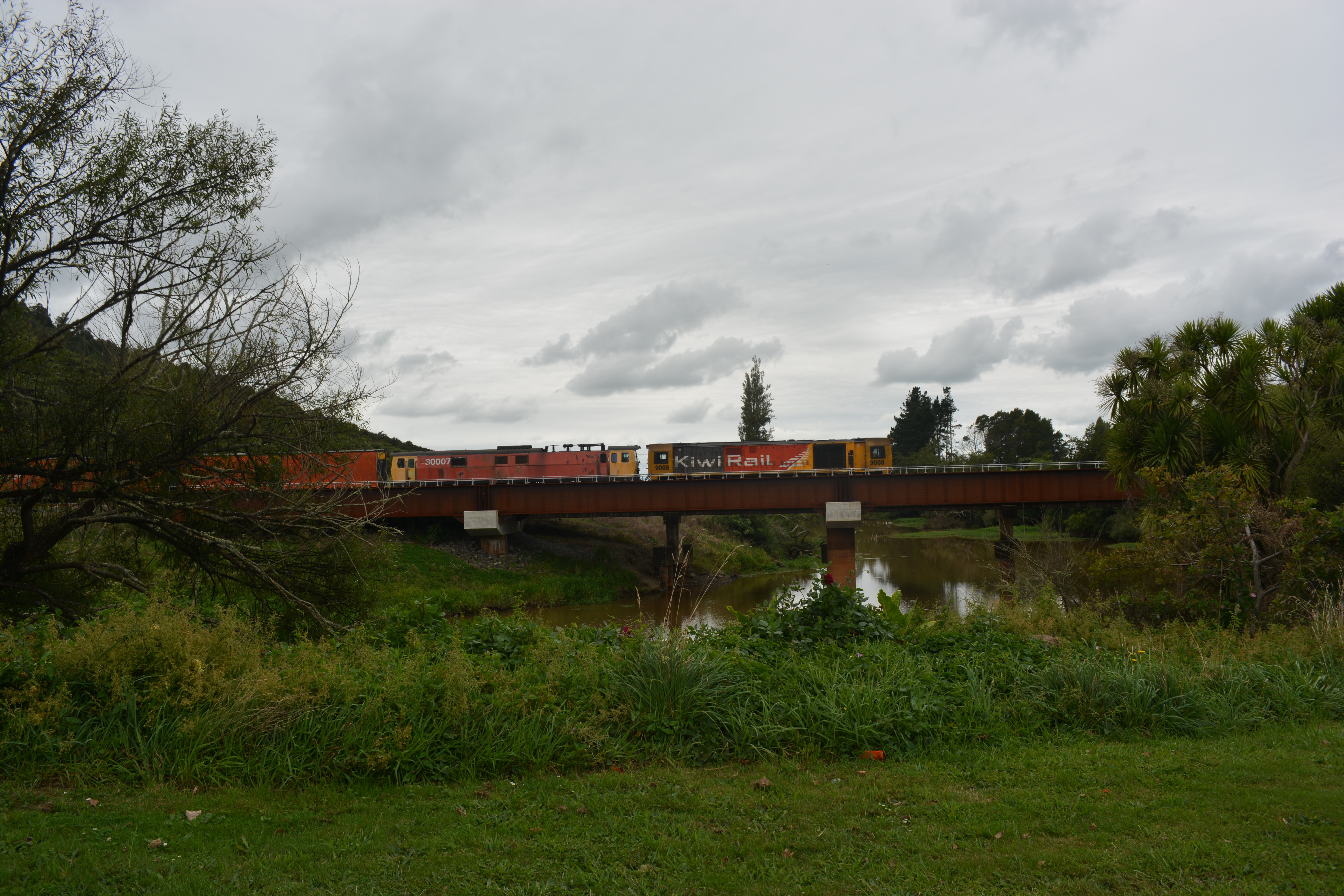 At Taupiri,New Zealand